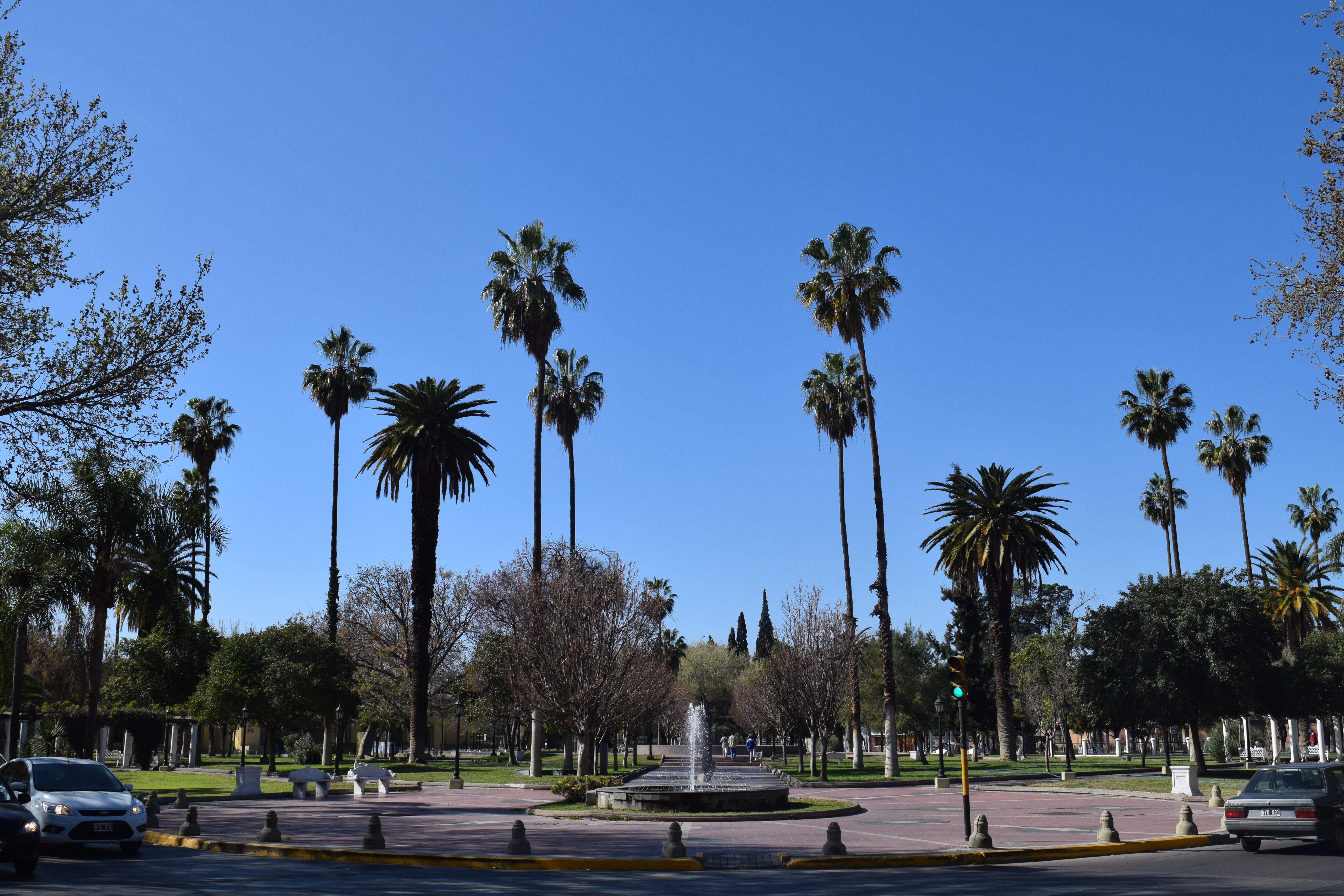 La Plaza Pedro del Castillo en la ciudad vieja de Mendoza, destruida por el terremoto de 1861.